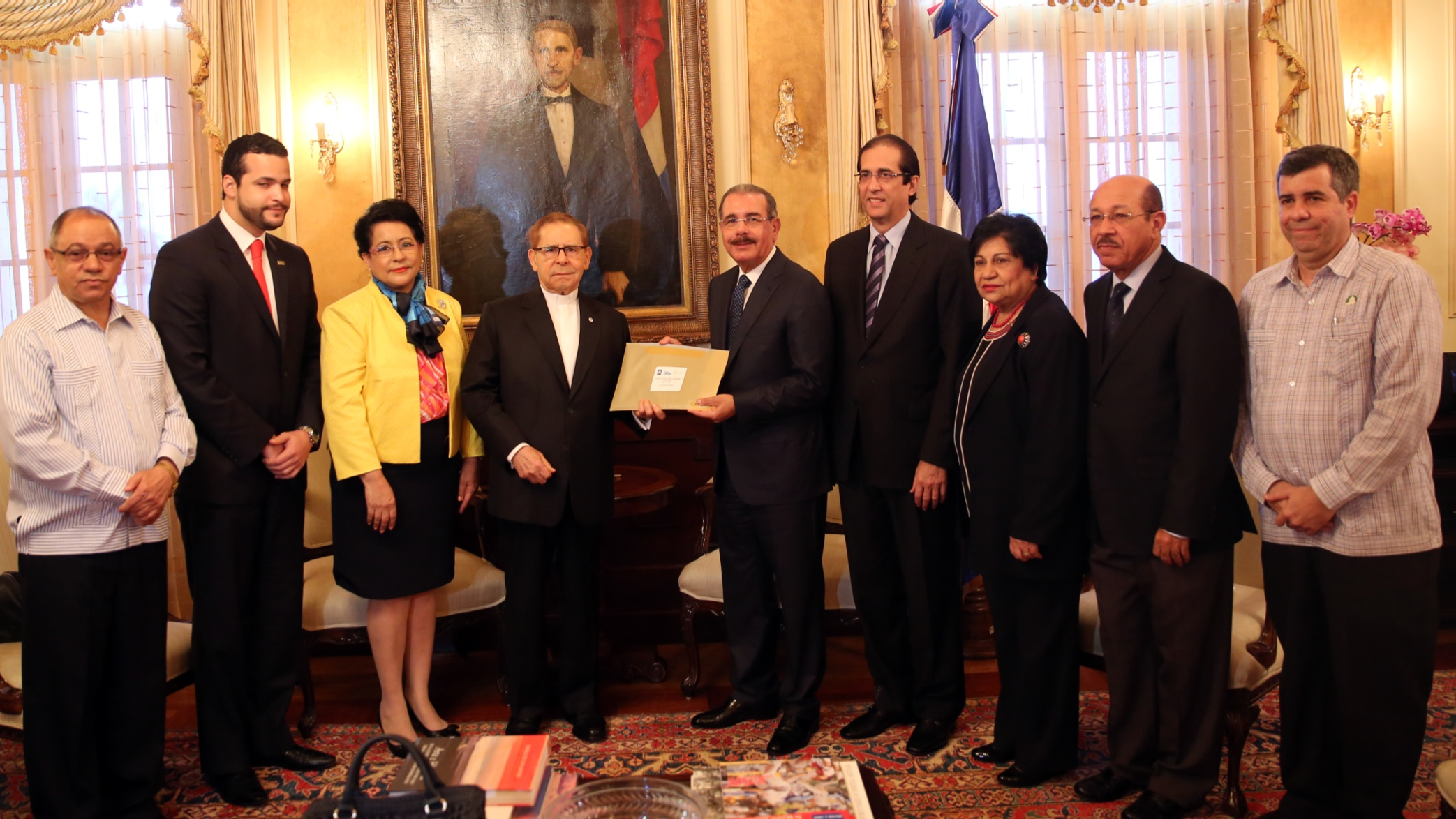 Entrega documento Pacto Educativo de la República Dominicana